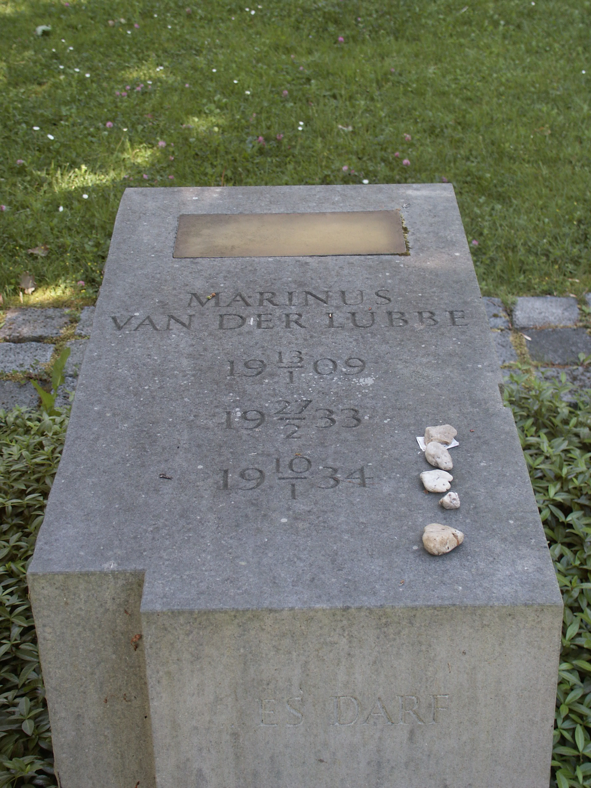 Gedenkteken Van der Lubbe op het Südfriedhof in Leipzig (Memorial Van der Lubbe at the Südfriedhof in Leipzig). Pim Brascamp 19 mei/May 2007.